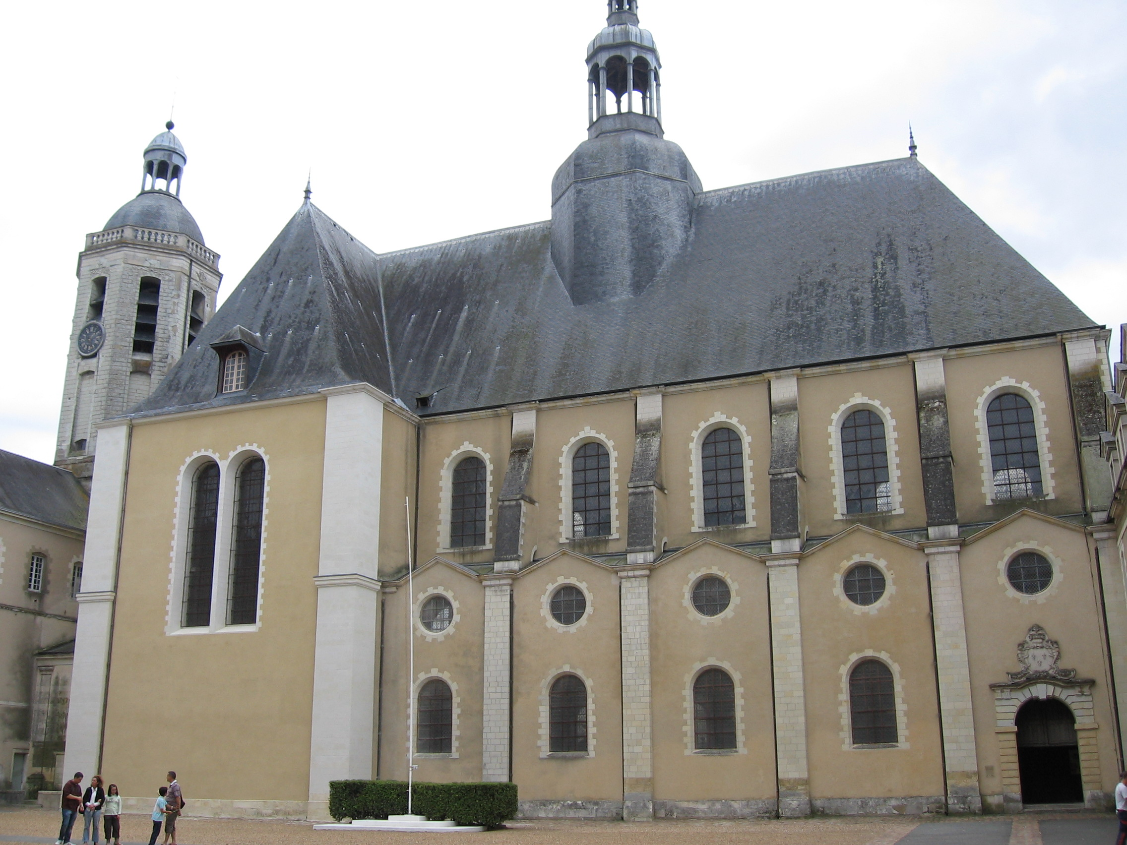 Eglise Saint-Louis, à l'intérieur de l'ancien collège des jésuites de La Flèche (Collège Henri IV)